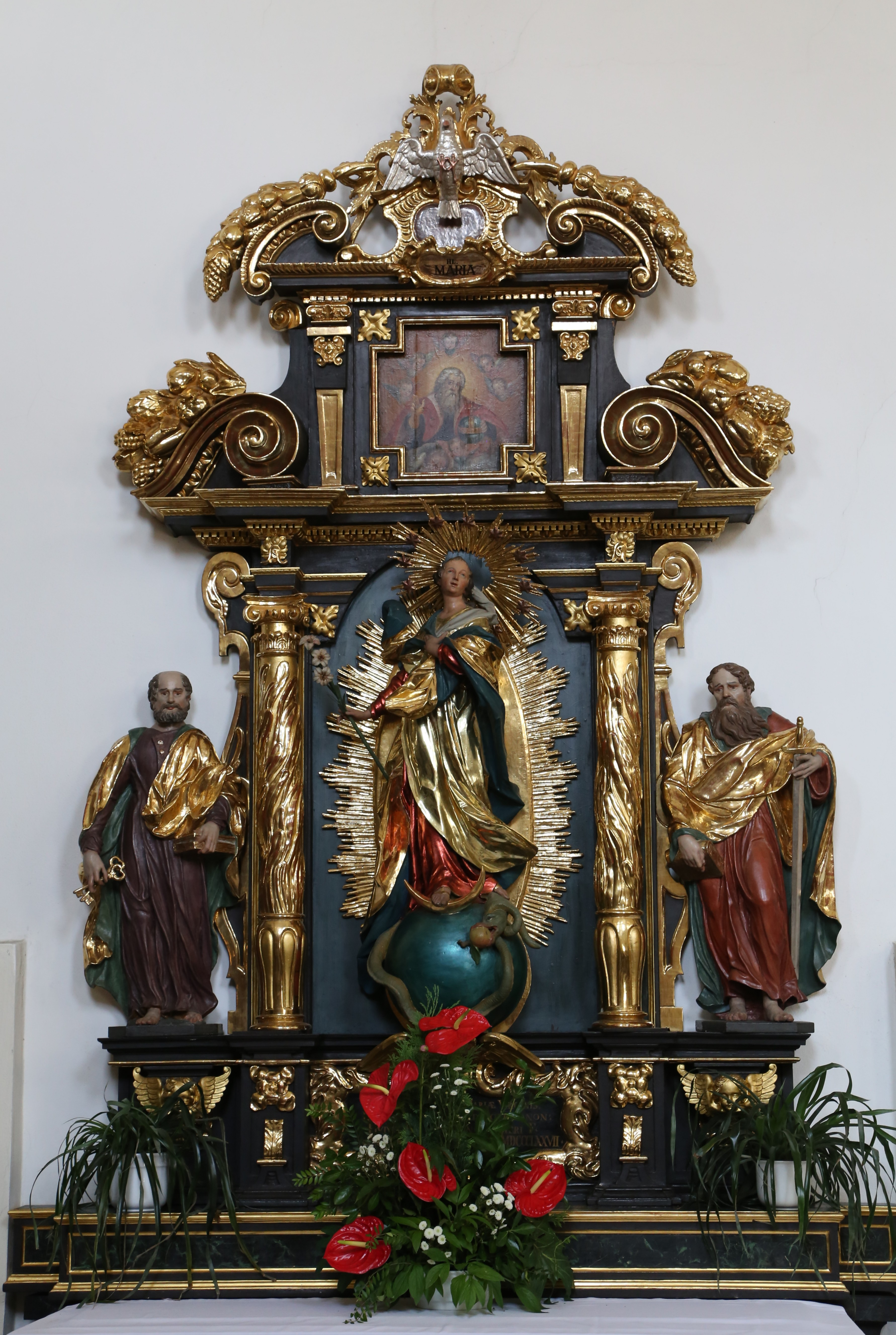 Krauterermarkt 5; Katholische Stiftskirche St. Johann, Saalbau mit eingezogenem Chor und nördlichem Chorflankenturm, Giebelfassade und Werksteingliederungen, im Kern von 1380/81, Langhaus 1766/69 weitgehend erneuert, Wiederaufbau nach Brand 1887; mit Ausstattung